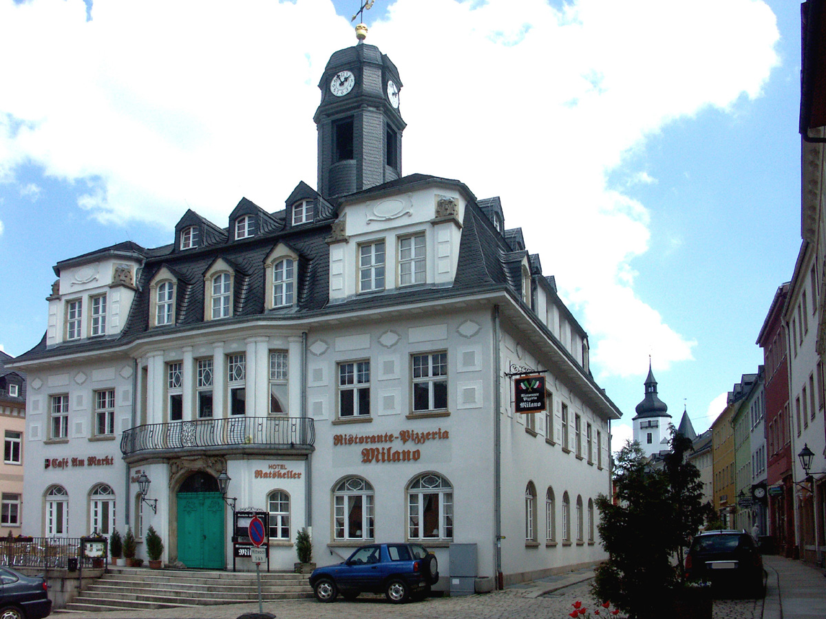 Schwarzenberg/Erzg.: Das ehemalige Rathaus